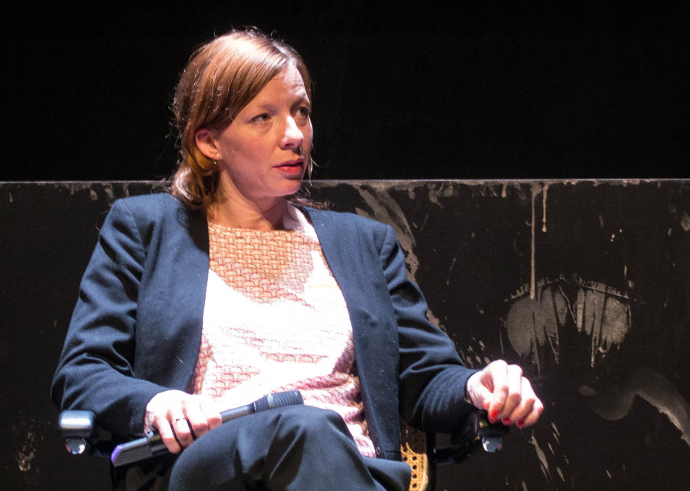 Bei einem Podiumsgespräch über "Popkulturpolitik: THEATER und die ökonomischen Verhältnisse" mit: Inka Löwendorf – Künstl. Leiterin Heimathafen Neukölln (abgebildet) Bernd Stegemann – Dramaturg (Schaubühne) Dietmar Bartsch – MdB, stellv. Vorsitzender Fraktion DIE LINKE Moderation: Britta Steffenhagen